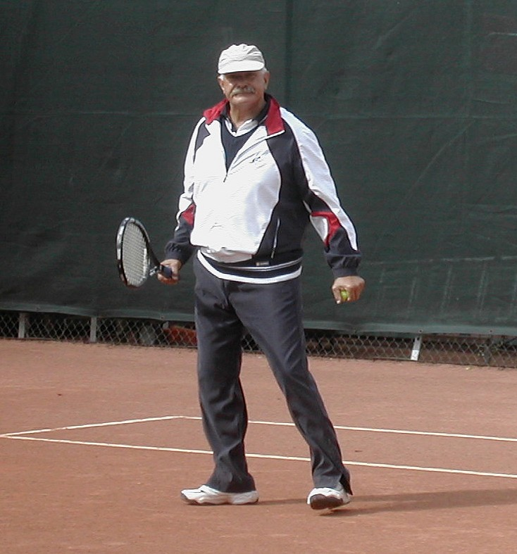 Nikita Michałkow na planie filmu "Persona non grata" w reż. K.Zanussiego. Korty MGU, Moskwa, 2.IX.2004.